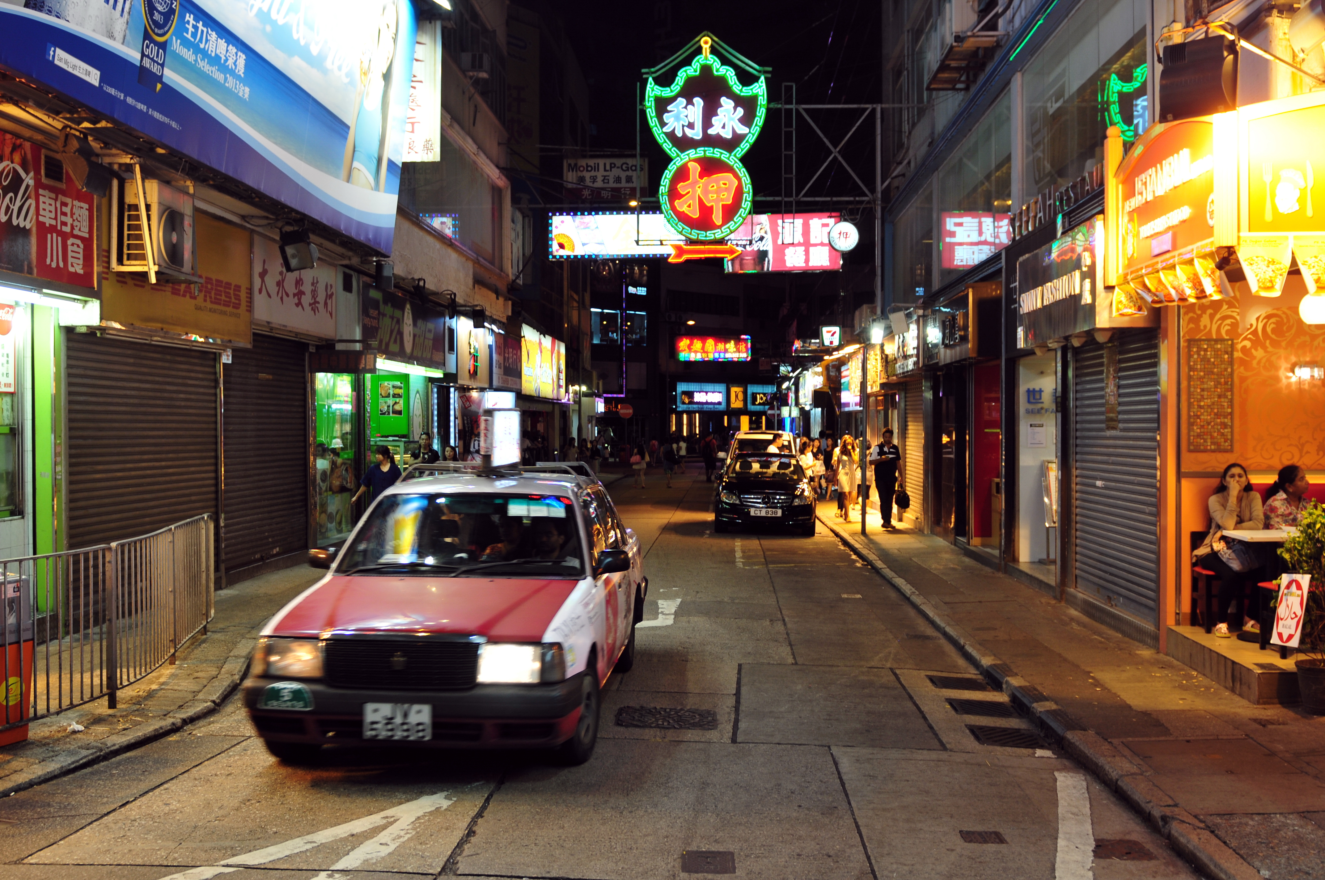 Wikimania 2013 Hongkong